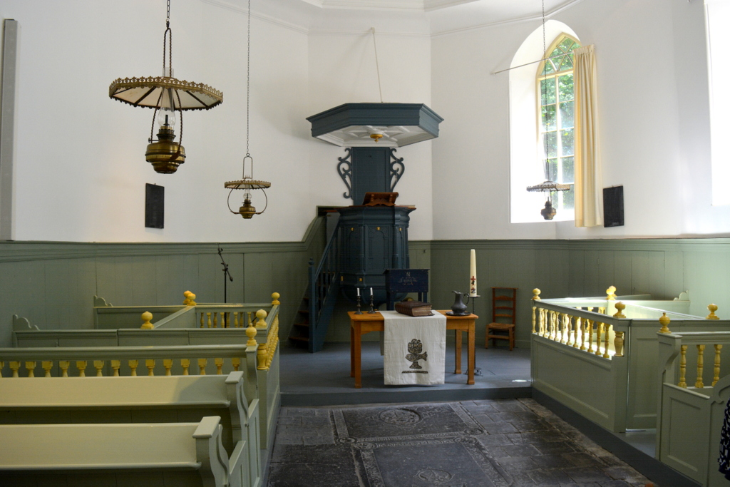 Nikolaastsjerke, Húns, ynterieur